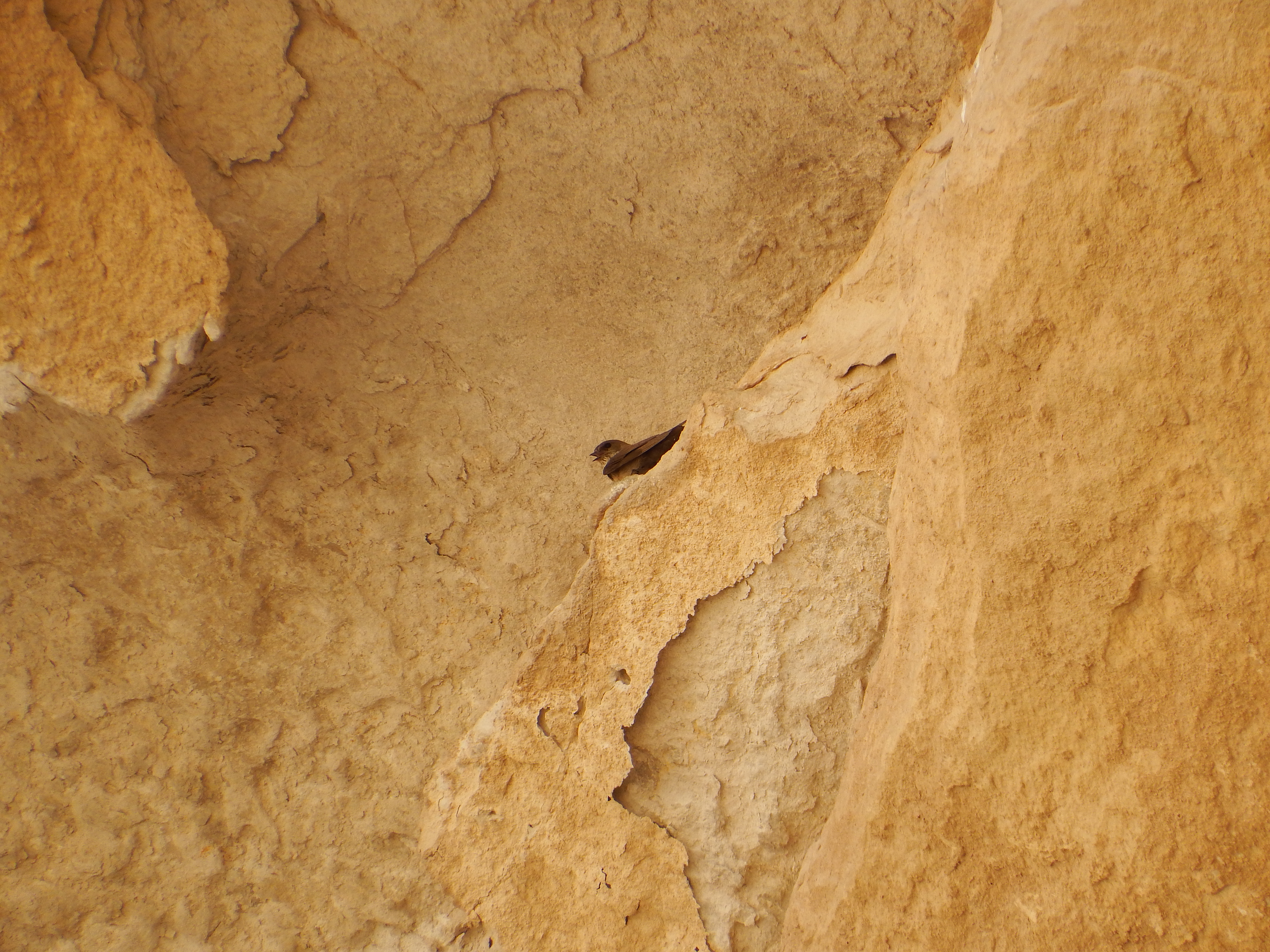 Гнездование скальной ласточки в ущелье Аккапчигая, северо-восточный конец хребта Джетымкаляс